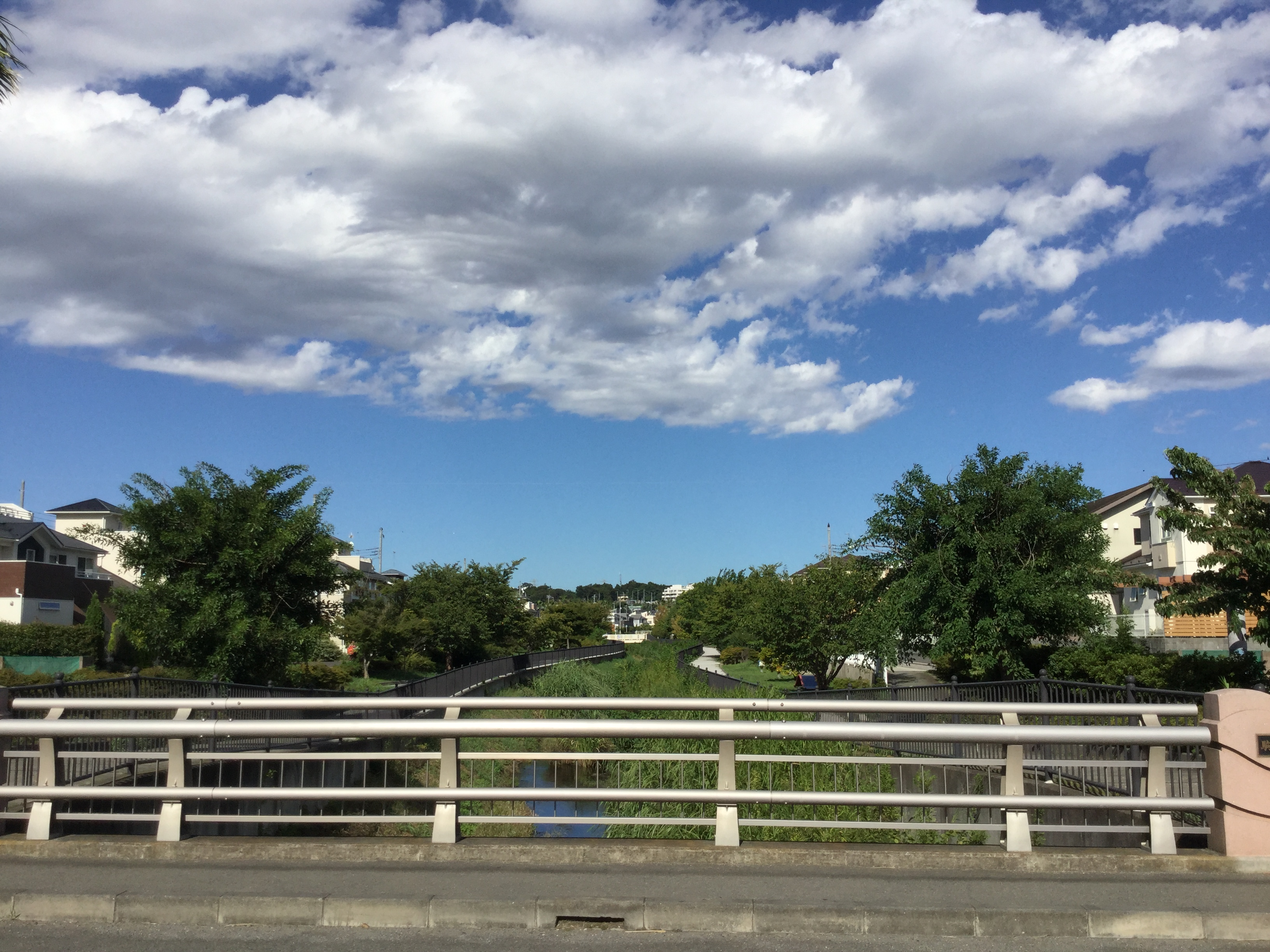 神奈川県茅ヶ崎市北部をながれる駒寄川